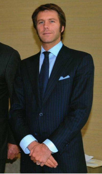 エマヌエーレ・フィリベルト・ディ・サヴォイア (1972-)